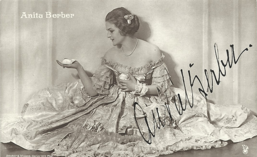 Anita Berber mit einer weißen Maus, signiert. Photopostkarte des Ateliers (Otto) Becker & (Heinrich) Maass. Aus der Serie Film-Sterne